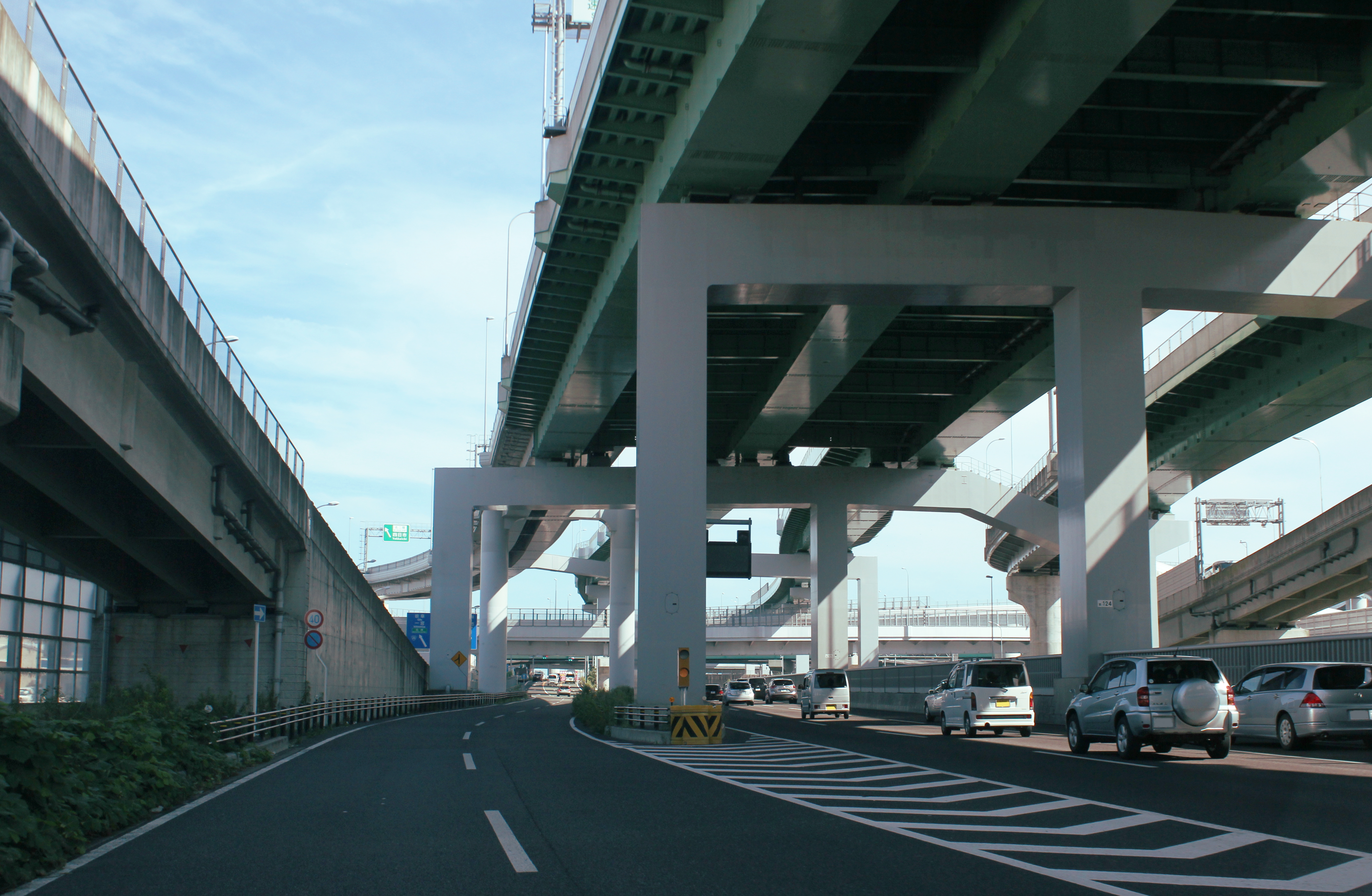 名古屋高速・名二環 清須JCT